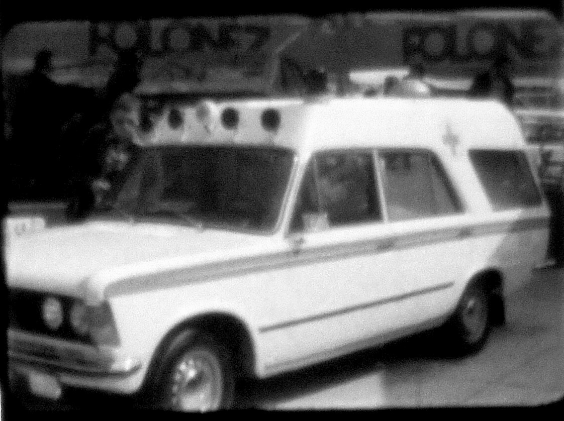 Kadr z amatorskiego filmu 8 mm. Polski Fiat 125p - sanitarka. Wersja o podwyższonym dachu, nie wprowadzona do realizacji ( Międzynarodowe Targi Poznańskie 1980 )